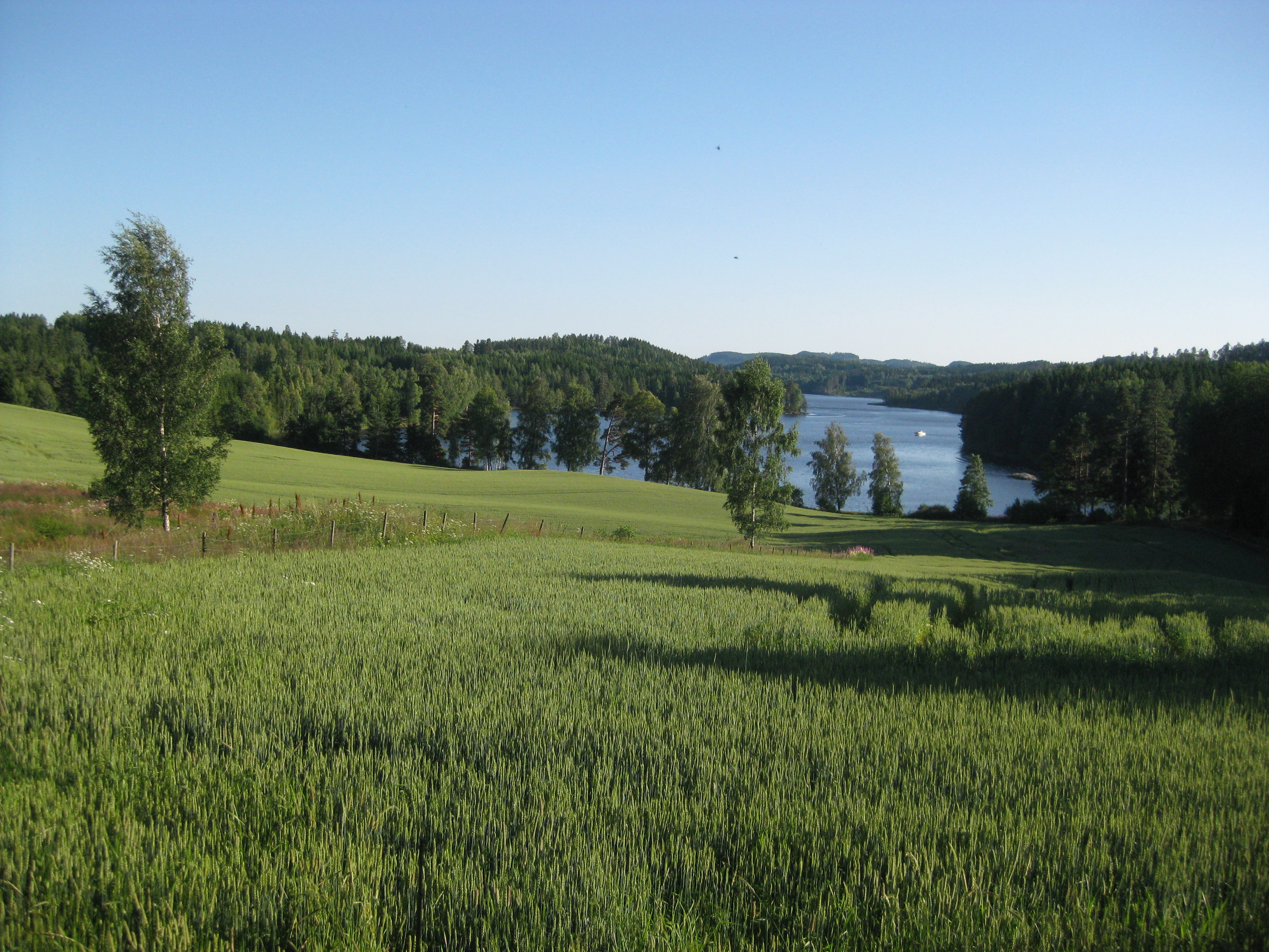 Øymarksjøen er en innsjø som ligger i kommunene Aremark og Marker i Østfold.